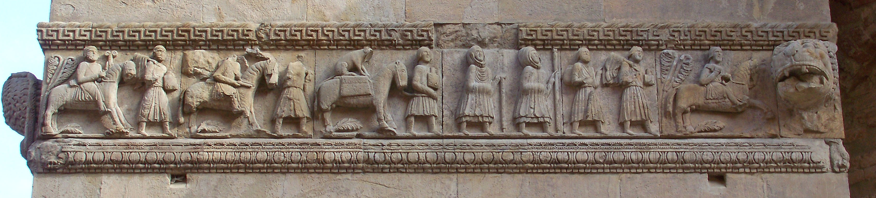 Duomo di Fidenza (provincia di Parma): bassorilievo con pellegrini in viaggio per Roma, situato su un lato della torre campanaria di destra. XII secolo.